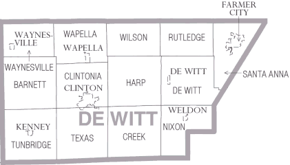 DeWitt County Illinois